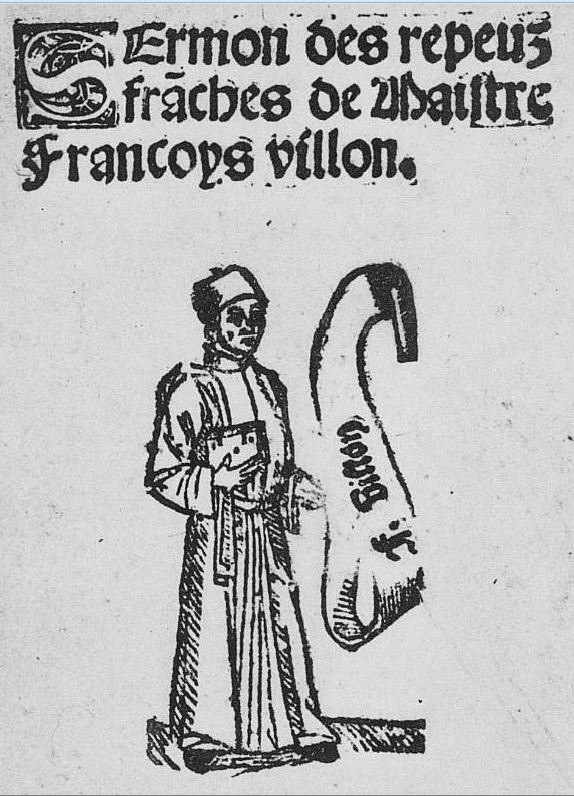 Ancienne édition des Repues Franches (autour de 1500).